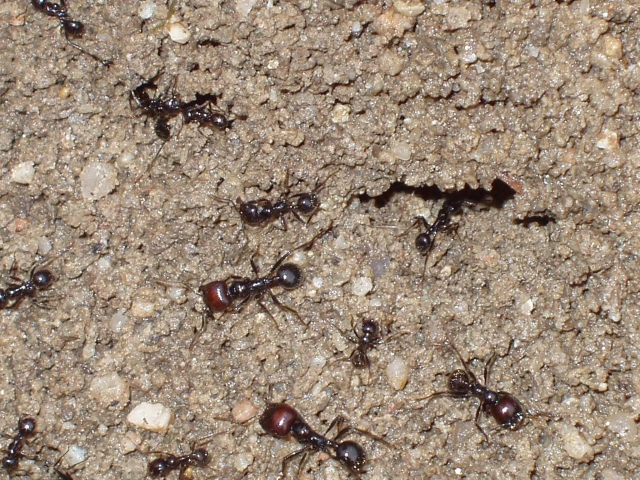 Hormiga granera (Messor barbarus)